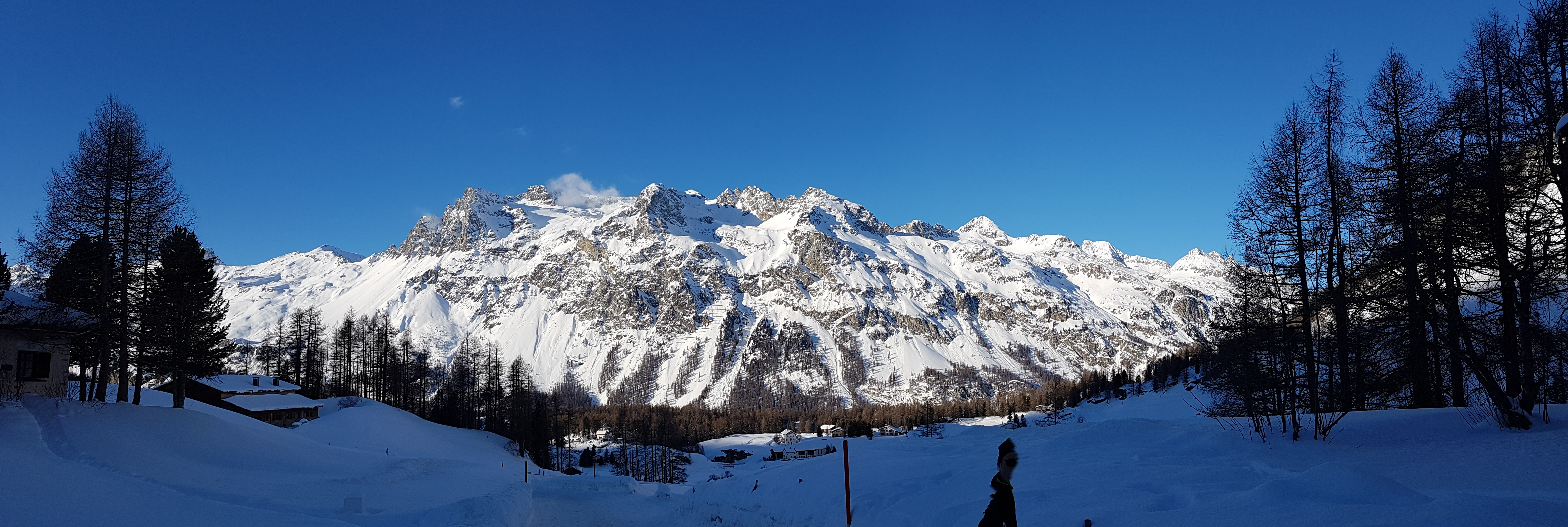 Fextal, Oberengadin, Graubünden, Schweiz. Blick auf Piz Lagrev / Piz Materdell